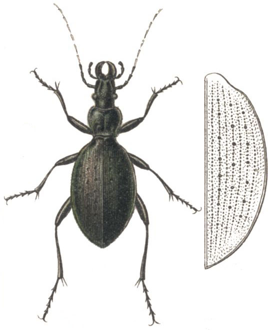 Creutzers Laufkäfer (Carabus creutzeri).